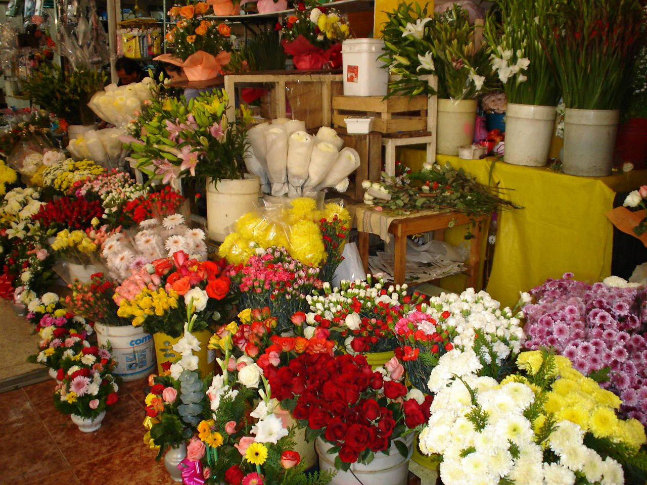 Puesto de flores en mercado tradicional mexicano